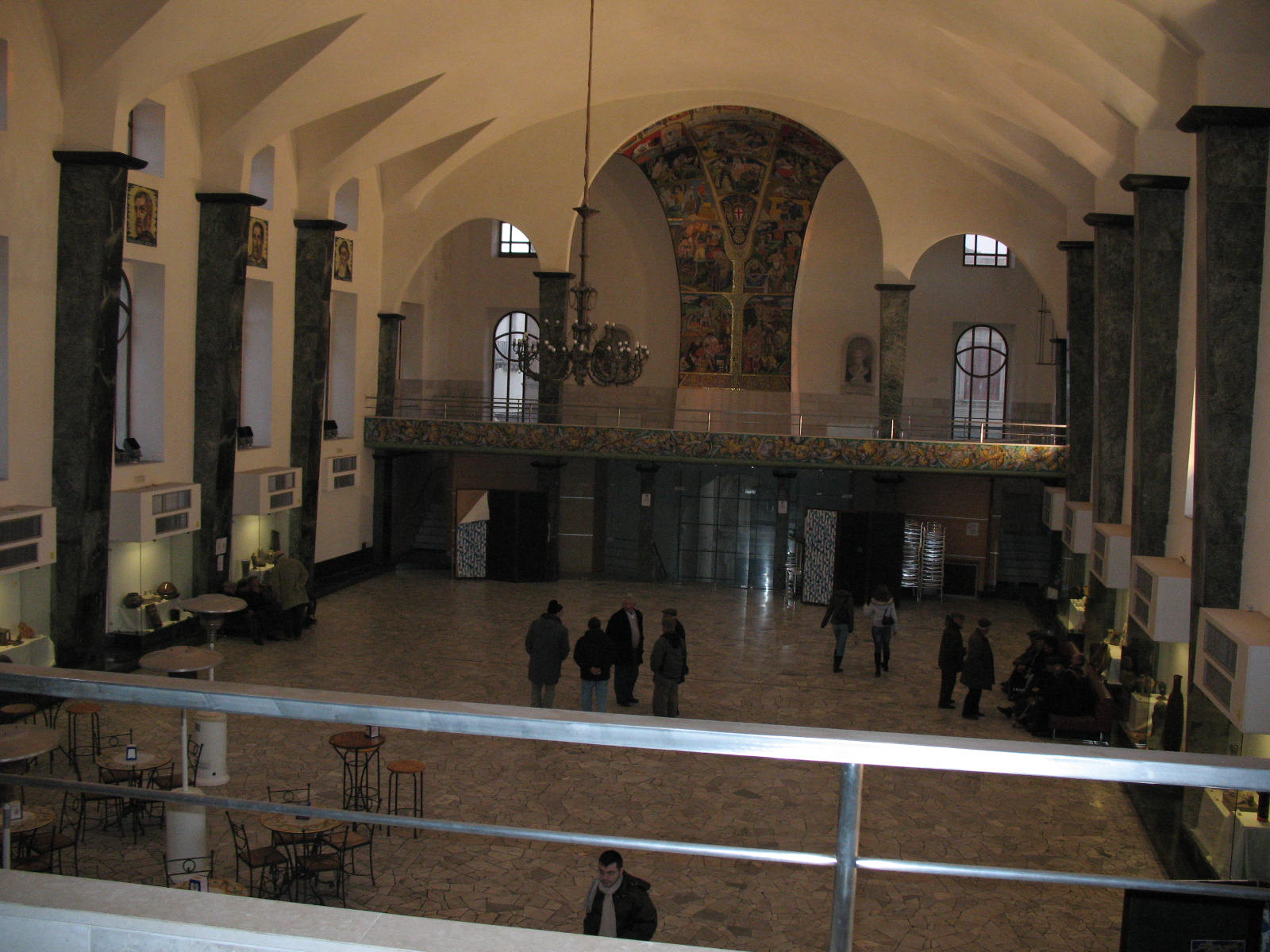 Galleria Luigi Sturzo, Galleria Luigi Sturzo